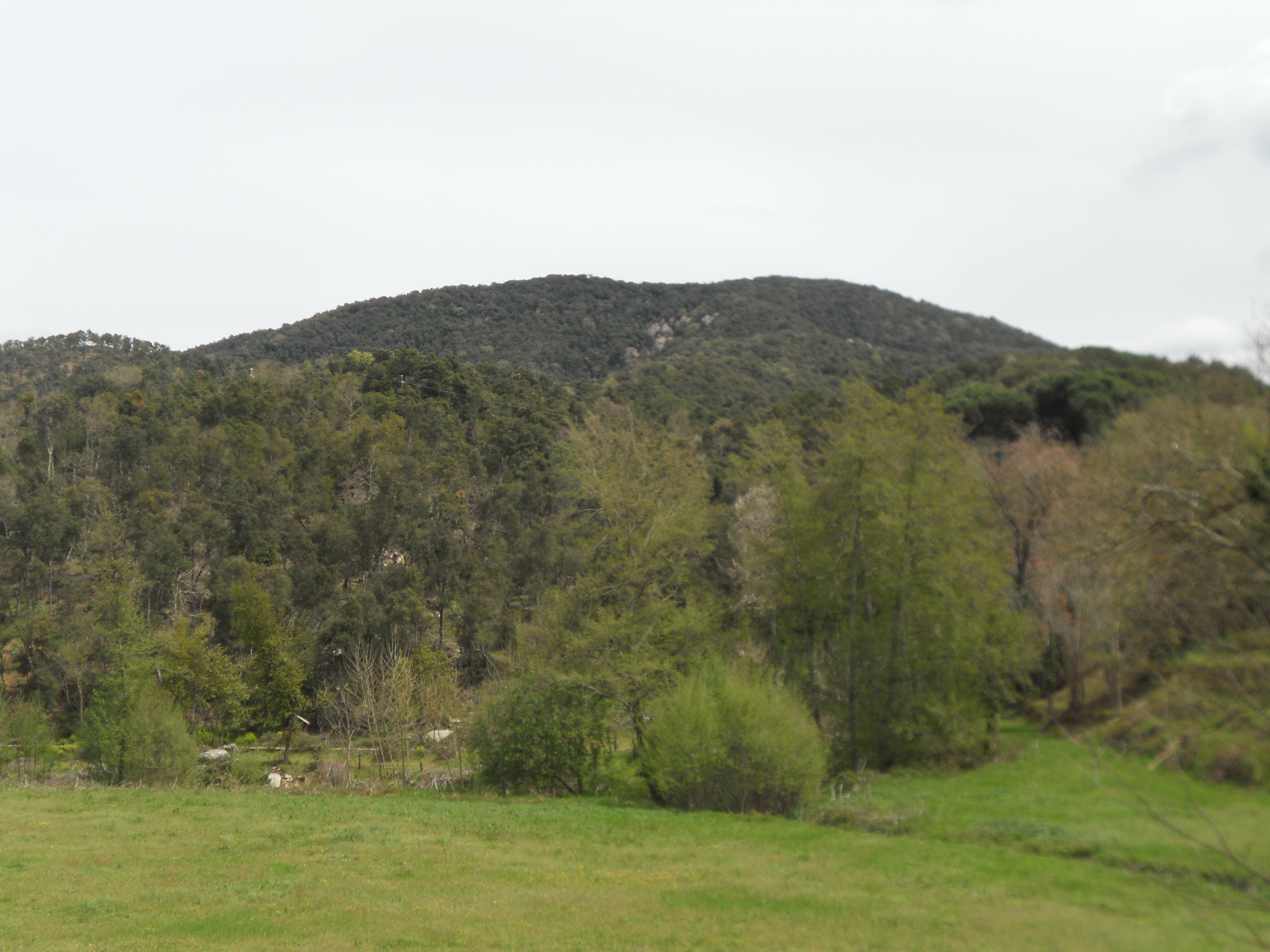 Cim del Montllorer, al terme d'Olzinelles, al Vallès Oriental.